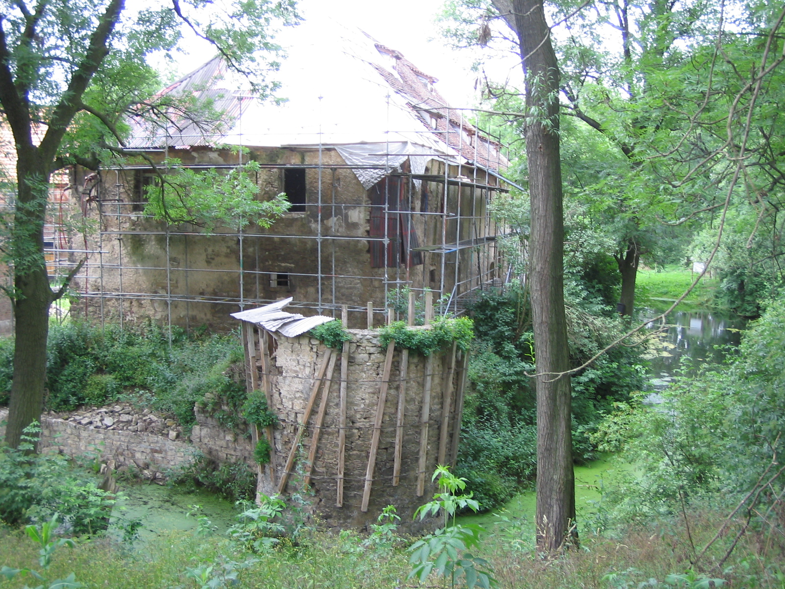 Turm der Wasserburg Ollendorf